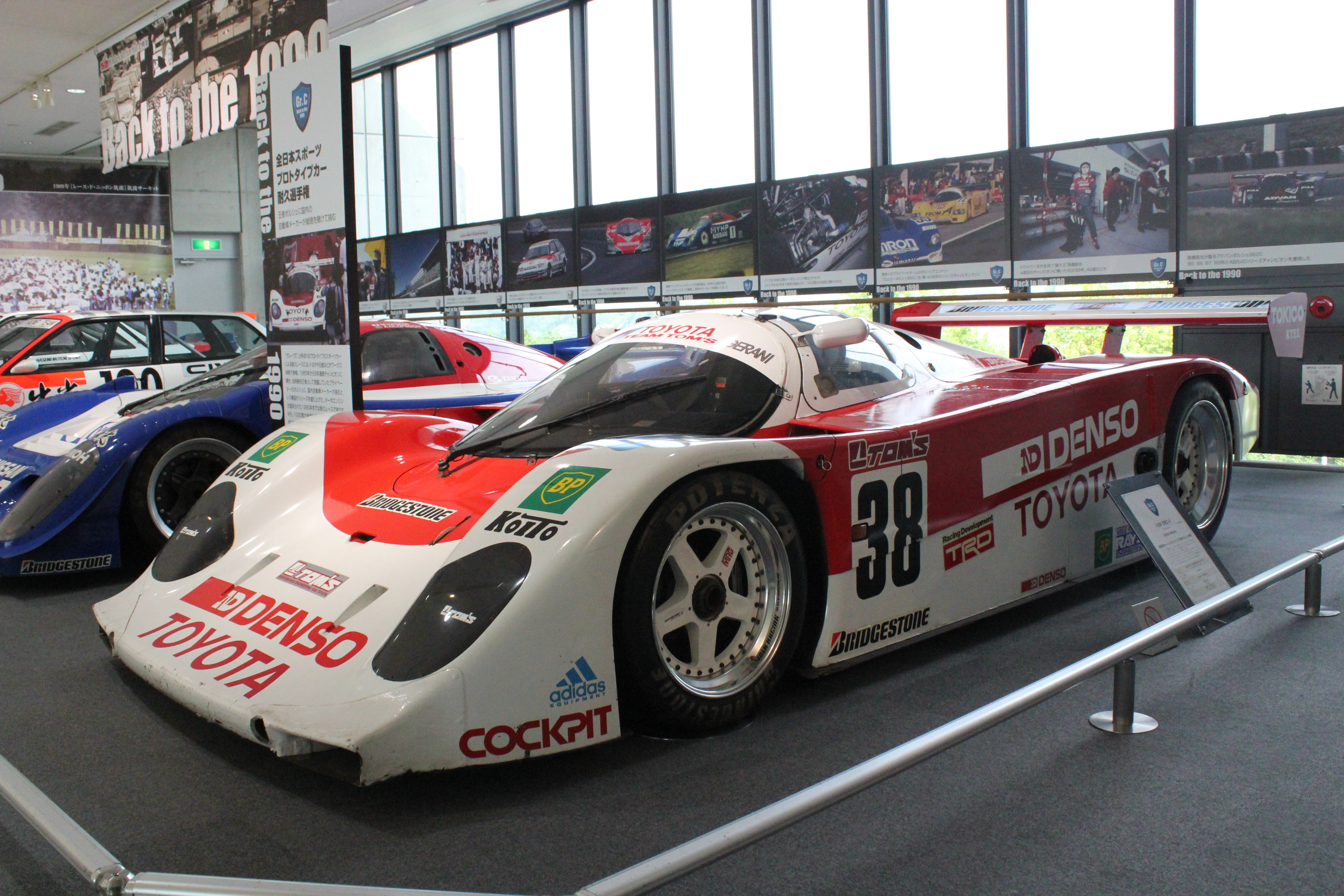 トヨタ・89C-V